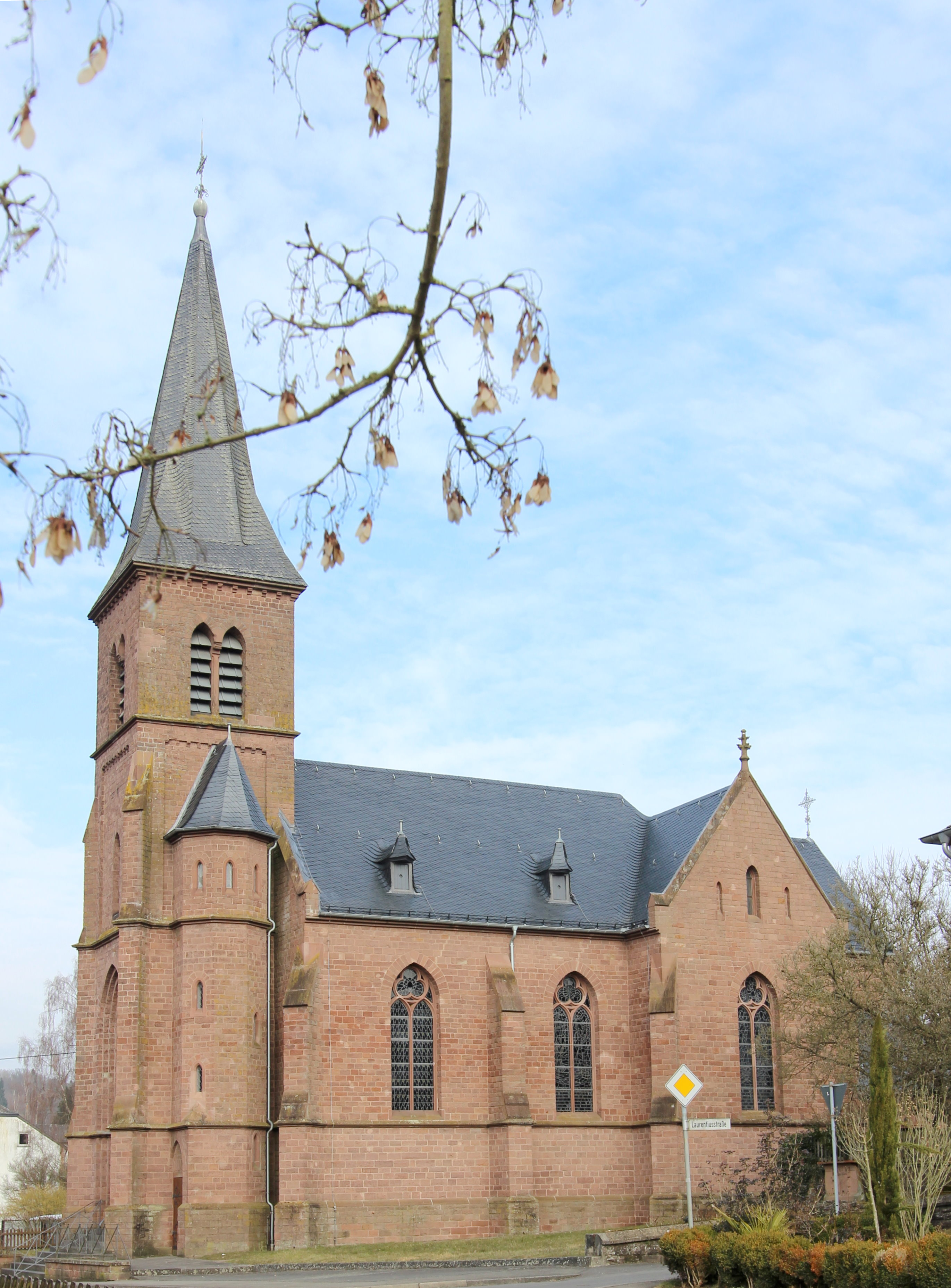 54634 Erdorf, Mainzer Straße. Neugotischer Rotsandsteinquaderbau mit Querhaus, 1896/97, Architekt Dombaumeister Reinhold Wirtz, Trier; mit Ausstattung. Aufnahme von 2018.